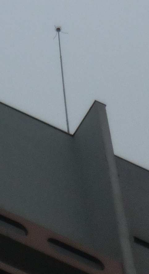 Description Paratonnerre radioactif au Radium 226 surmontant la Tour Beaugrenelle (75015 PARIS) Date17 November 2011SourcePhoto prise par l'auteurAuthorUtilisateur:Hst2n225Permission (Reusing this file) Libre diffusion mais citer l'auteur Paratonnerre radioactif au Radium 226 surmontant la Tour Beaugrenelle (75015 PARIS)